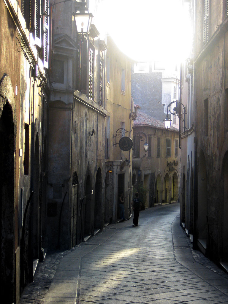 Anagni, Lazio, Italia